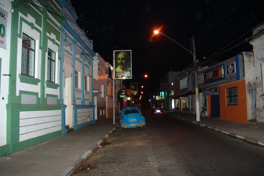 Imagem do município de Atibaia, estado de São Paulo, Brasil.